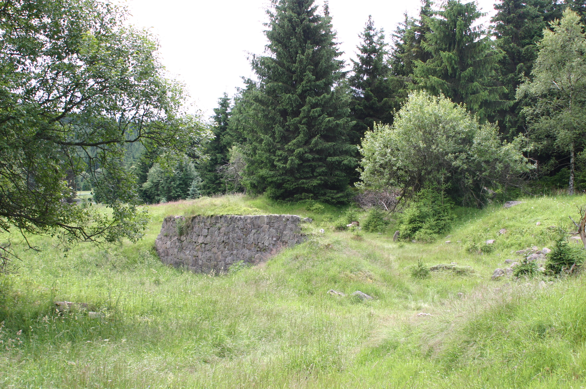 Základy domů v zaniklé obce Fláje v okrese Most.